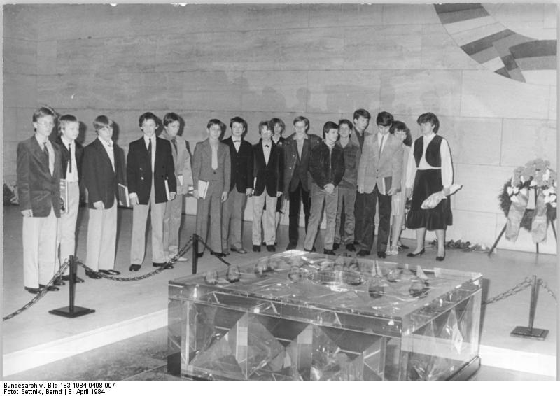 Berlin, Besuch eines Mahnmals nach der Jugendweihe ADN-ZB Settnik 8.4.84-erd-Berlin: Nach der Jugendweihefeier gedachten Jungen und Mädchen der Kurt-Schlosser-Oberschule des Stadtbezirkes Friedrichshain im Mahnmal Unter den Linden der Opfer des Faschismus und Militarismus.